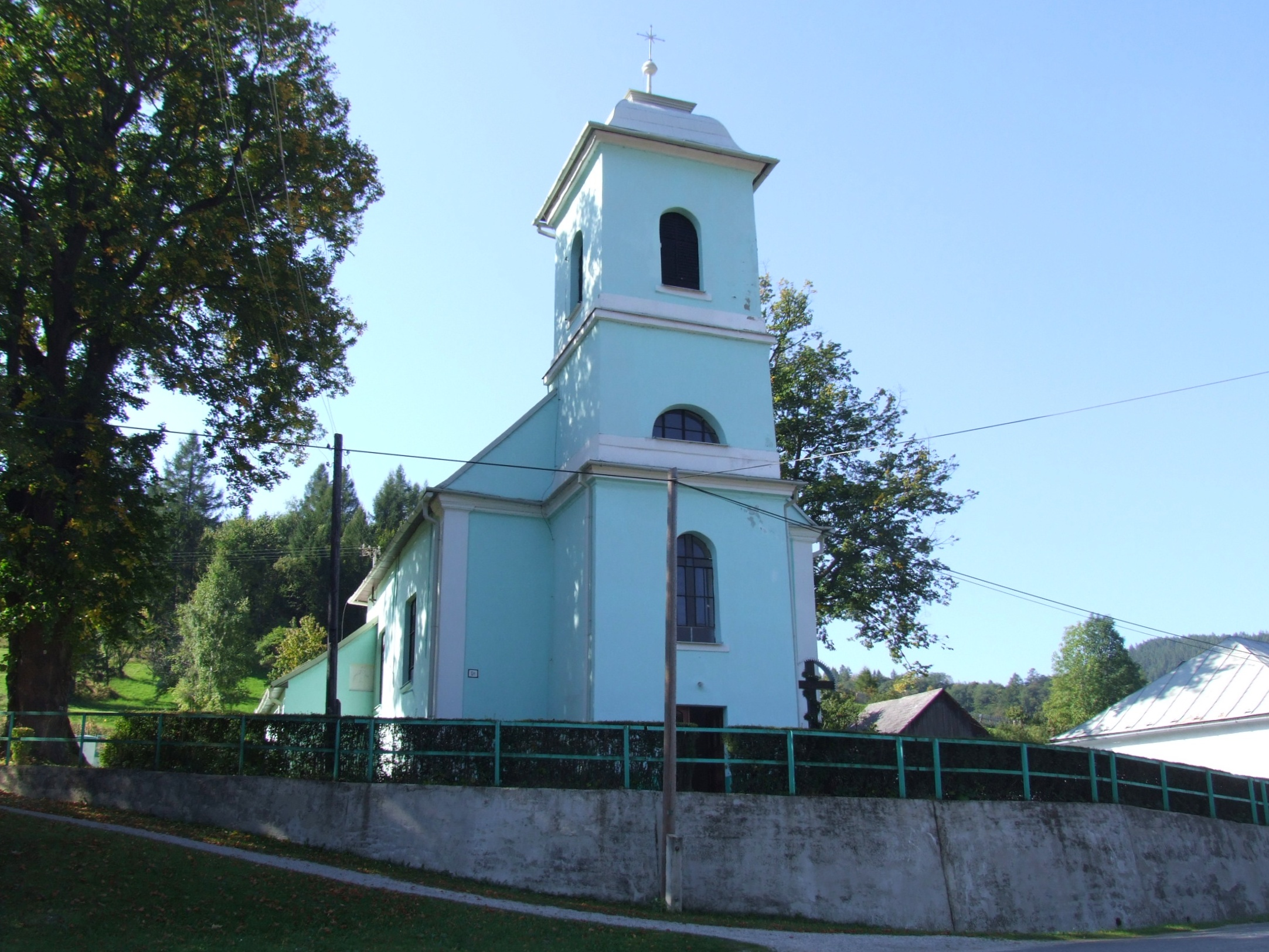 Kościół w Relowie (Reľov)